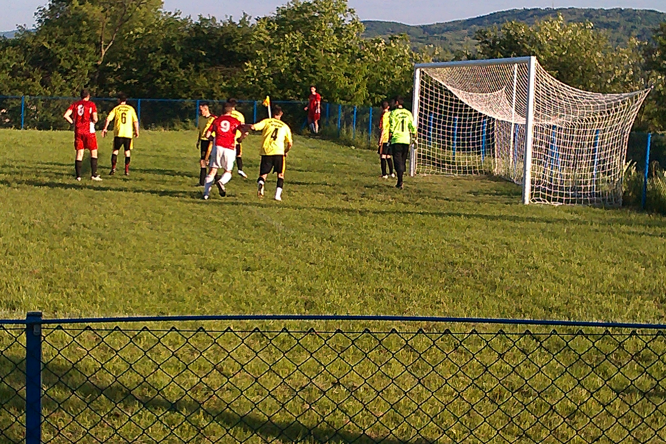 Srpski (latinica): Mladost Crni Kao - Napredak Malo Krčmare 6:0